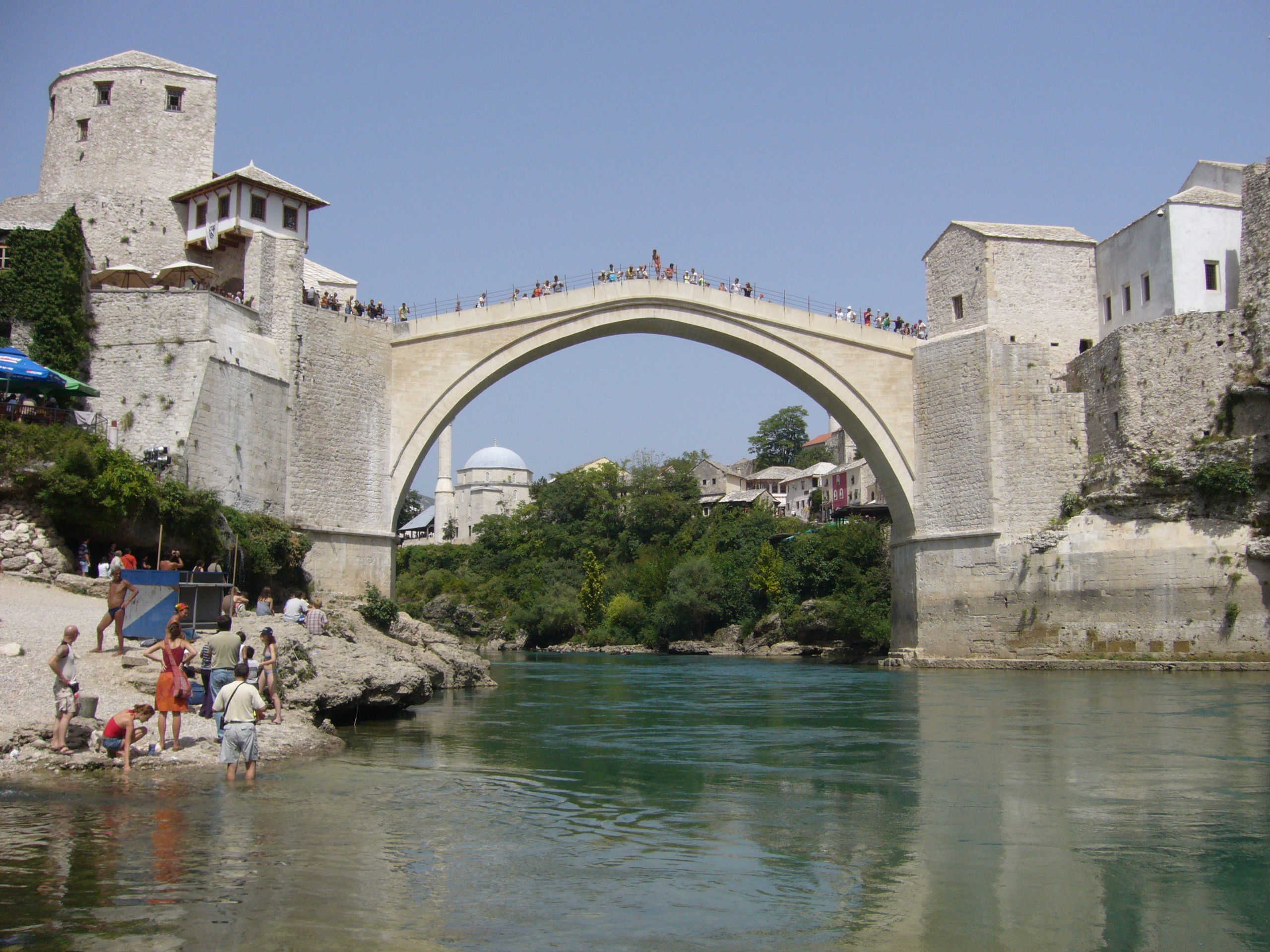 Uno de los puentes más famosos de visitar, digno de una ciudad como Mostar. Con 500 años y realizado por los turcos, fue destruido por los croatas durante la Guerra de los Balcanes. En 2004 se inauguró de nuevo.